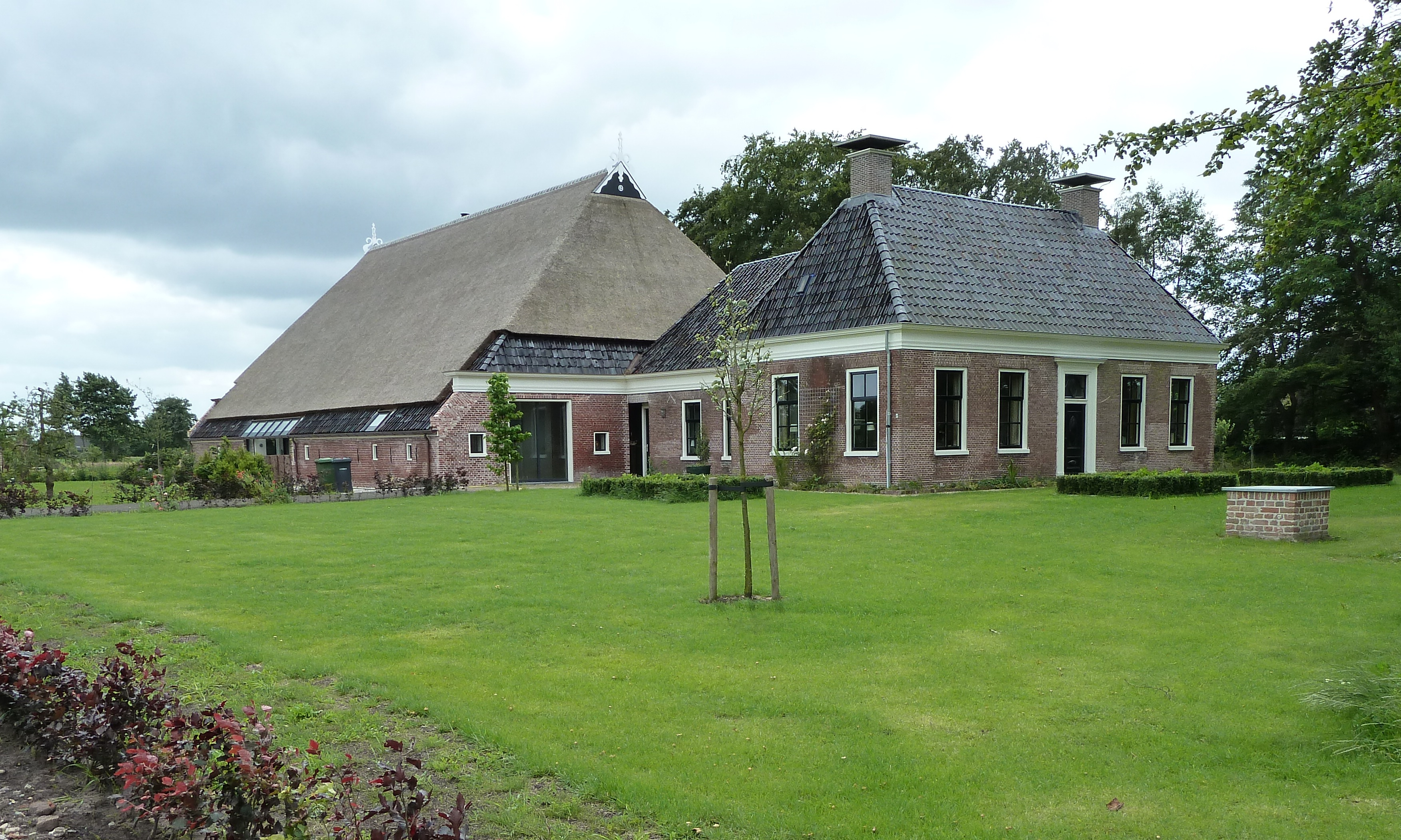 Boerderij met dwarshuis onder schilddak aan 't Pad 4 in Niebert (Marum, Groningen, Nederland). Gebouwd tussen 1851 en 1852.